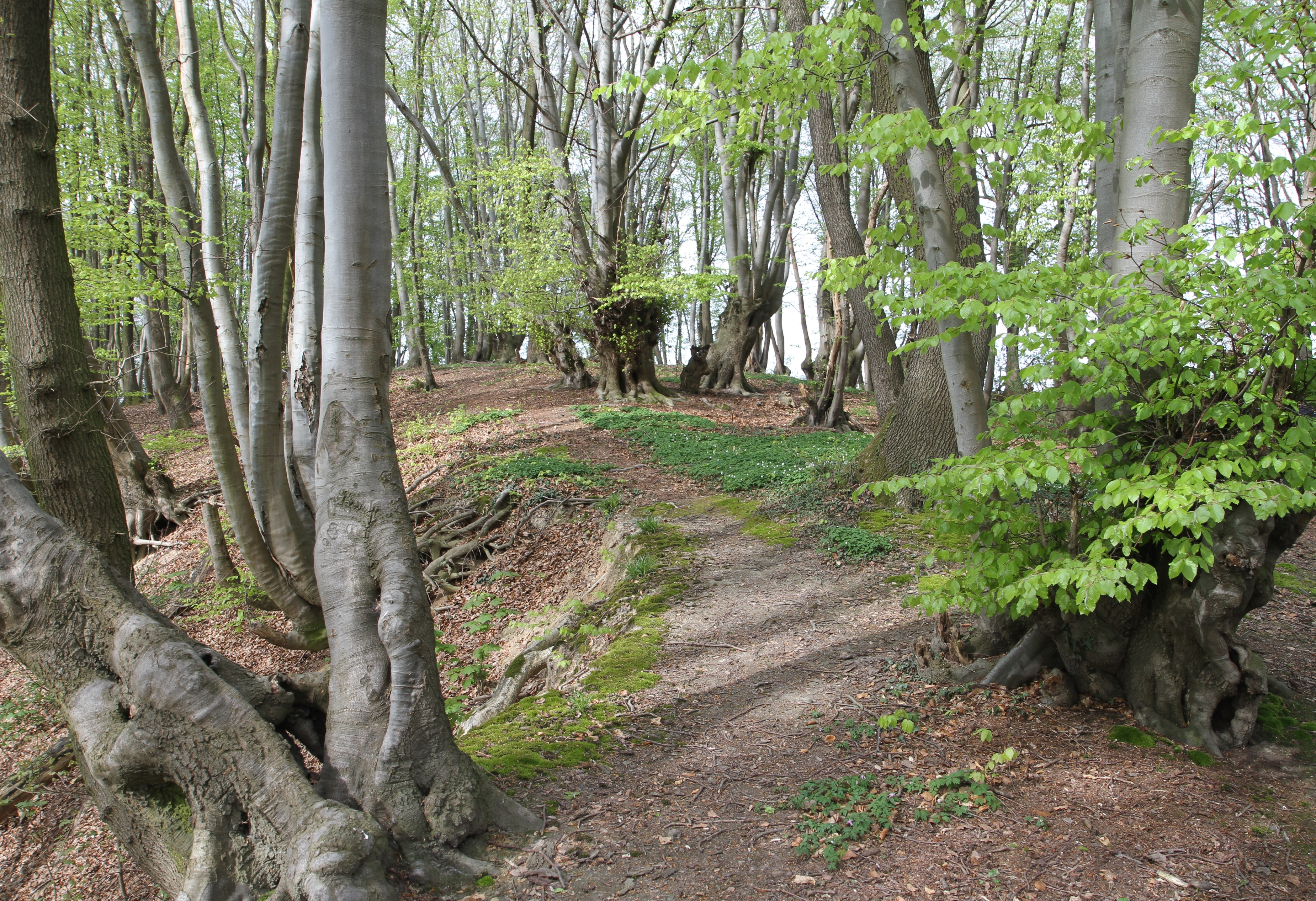 Wald im Naturschutzgebiet Dächelsberg/Ließemer Berg